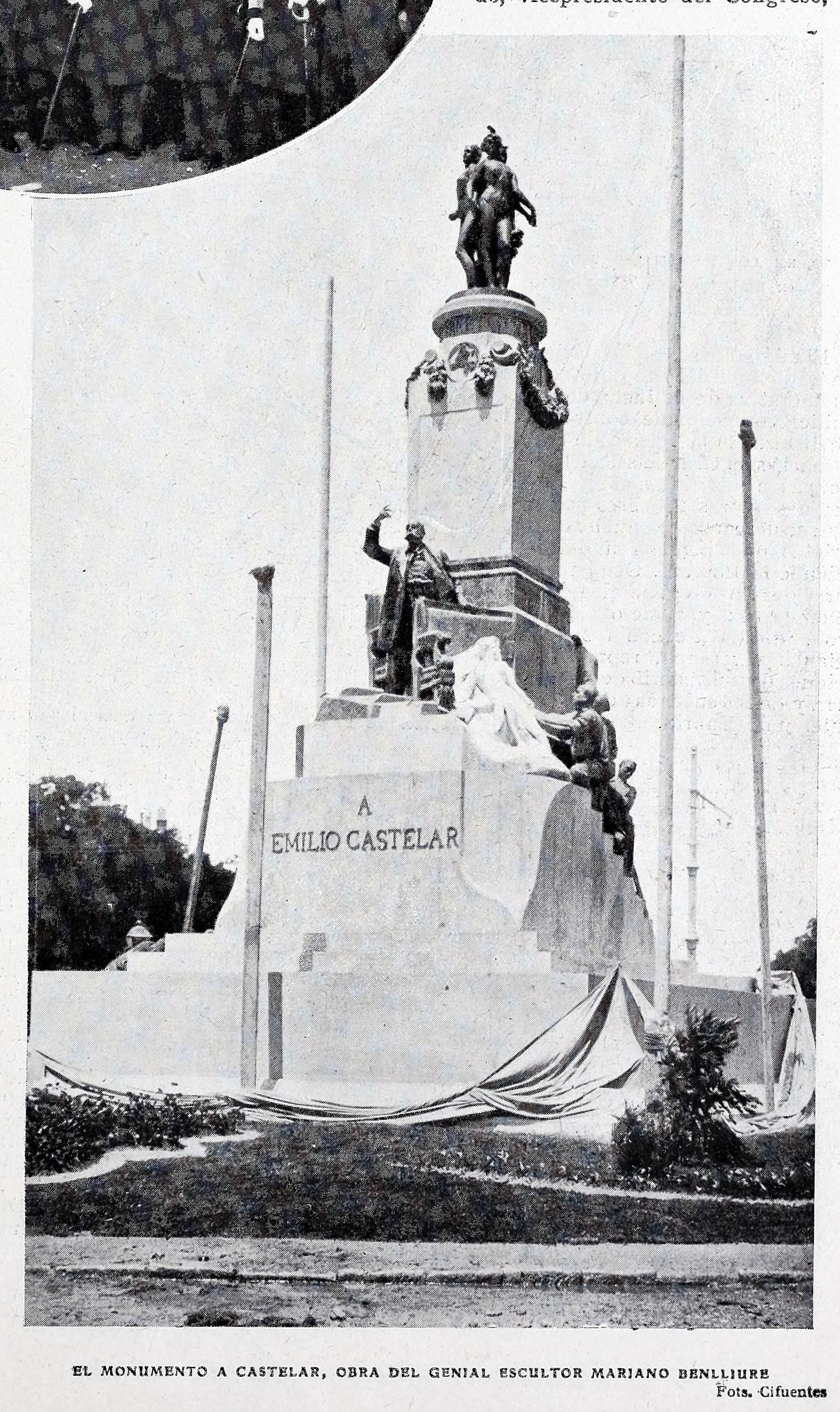 El monumento a Castelar, obra del genial escultor Mariano Benlliure.